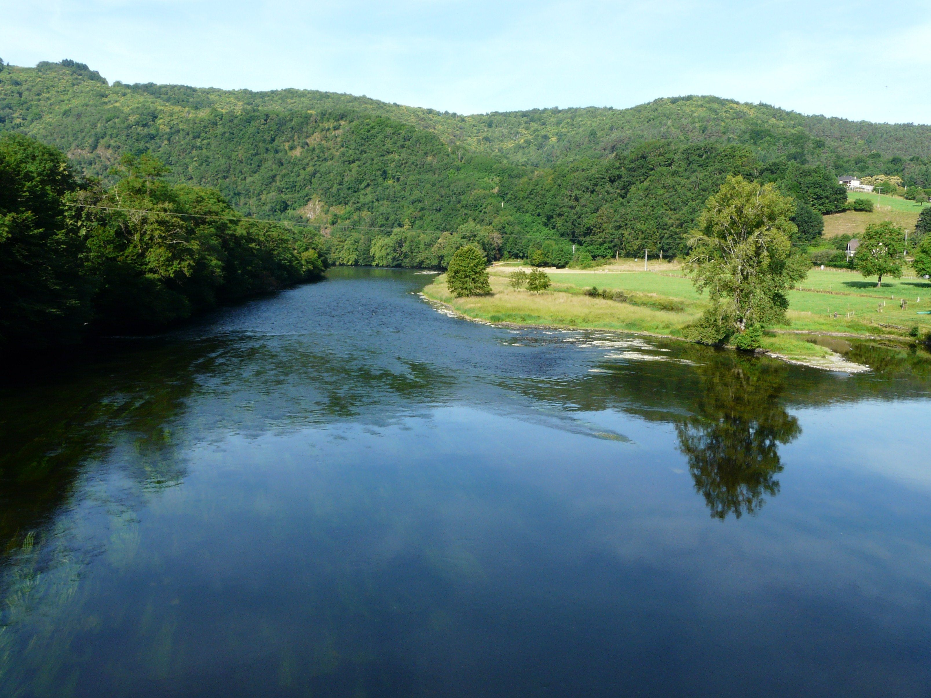 La Dordogne en aval du pont de la route départementale 12E2, à Monceaux-sur-Dordogne, Corrèze, France.